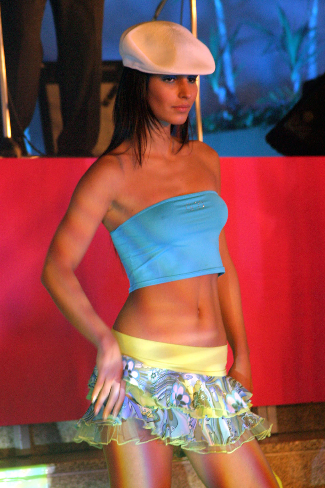 Lúcia Garcia